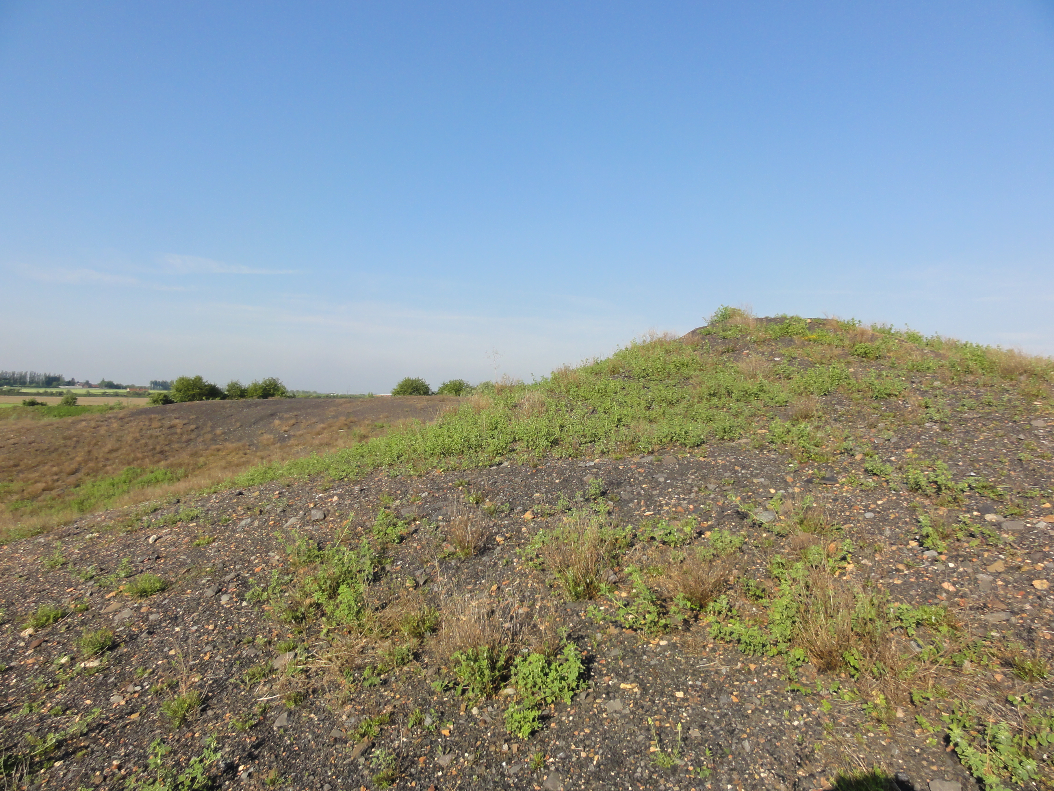 Terril n° 150 dit Agache, Fosse Agache de la Compagnie des mines d'Anzin, Fenain, Nord, Nord-Pas-de-Calais, France.